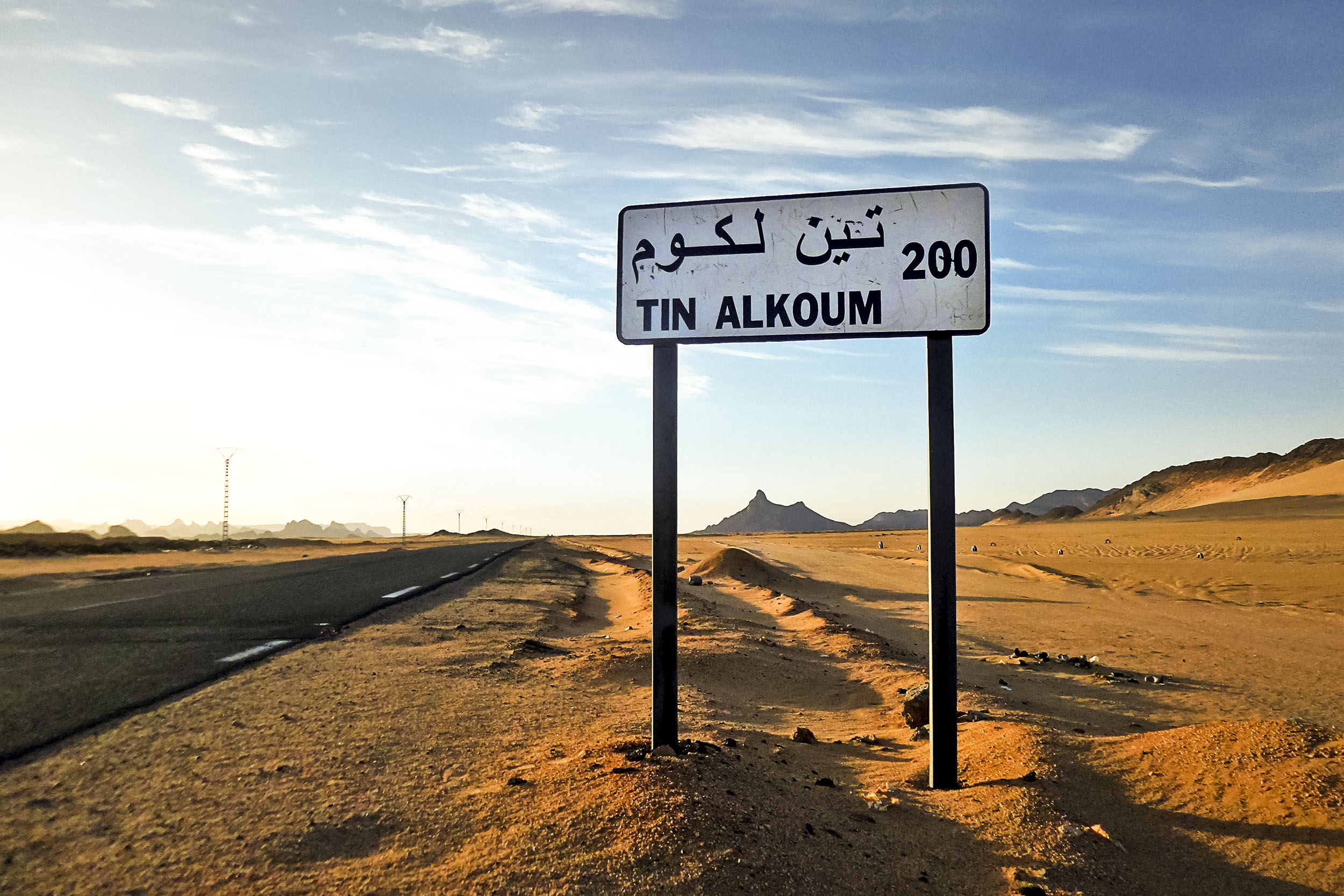 Djanet - Tine Alkoum 200 km تين الكوم